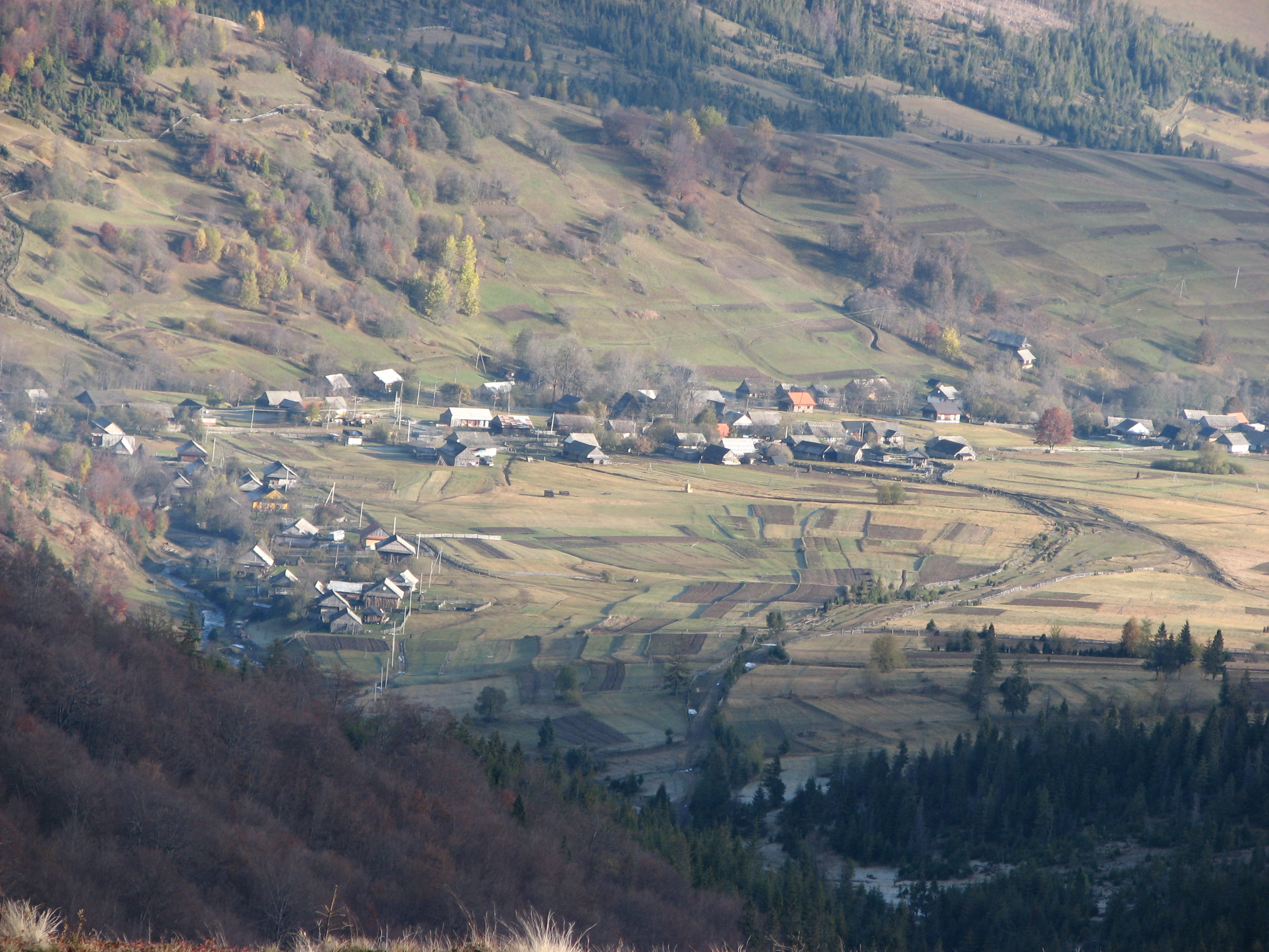 с. Либохора (Турківський р-н)